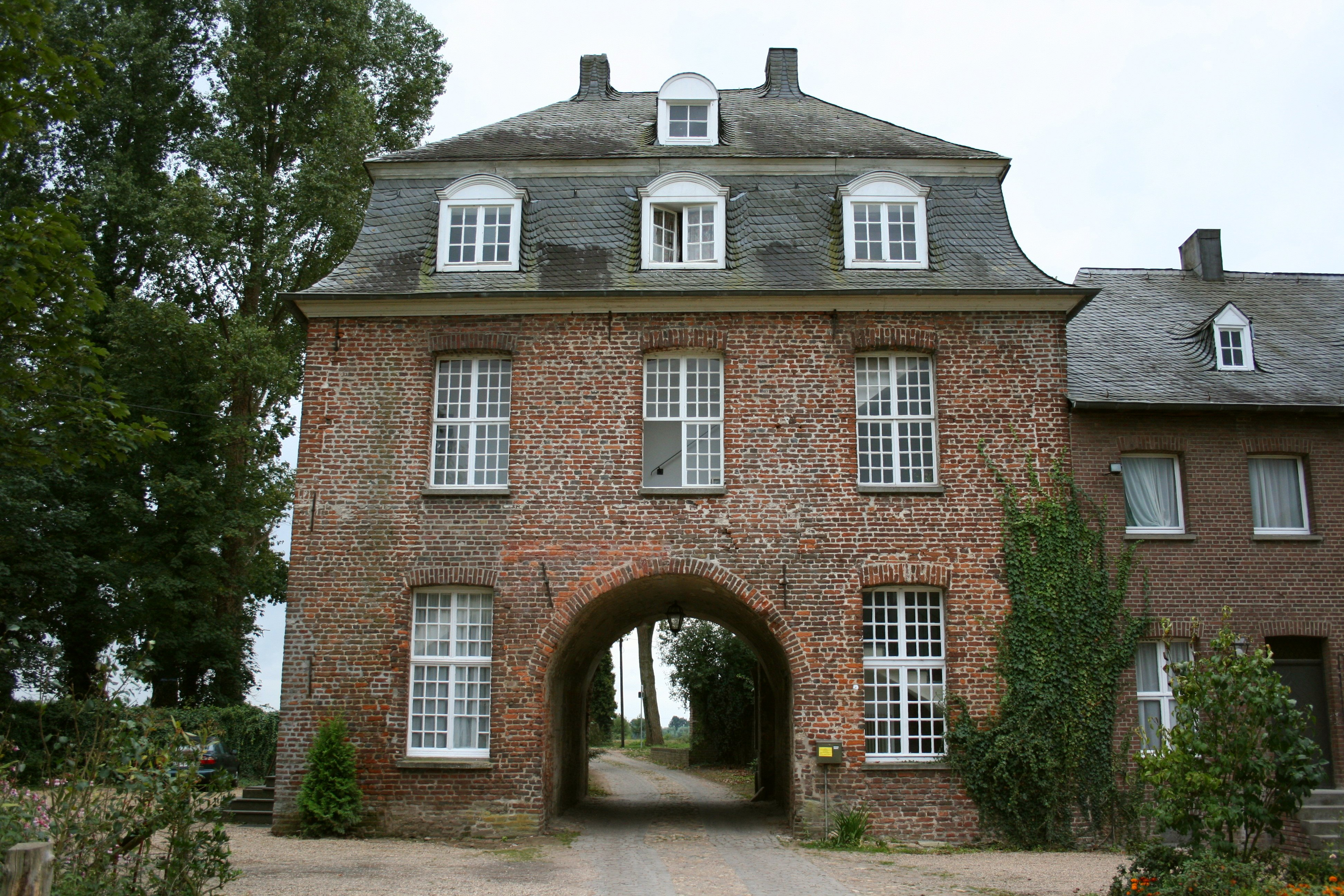 Kloster Graefenthal in Goch-Asperden